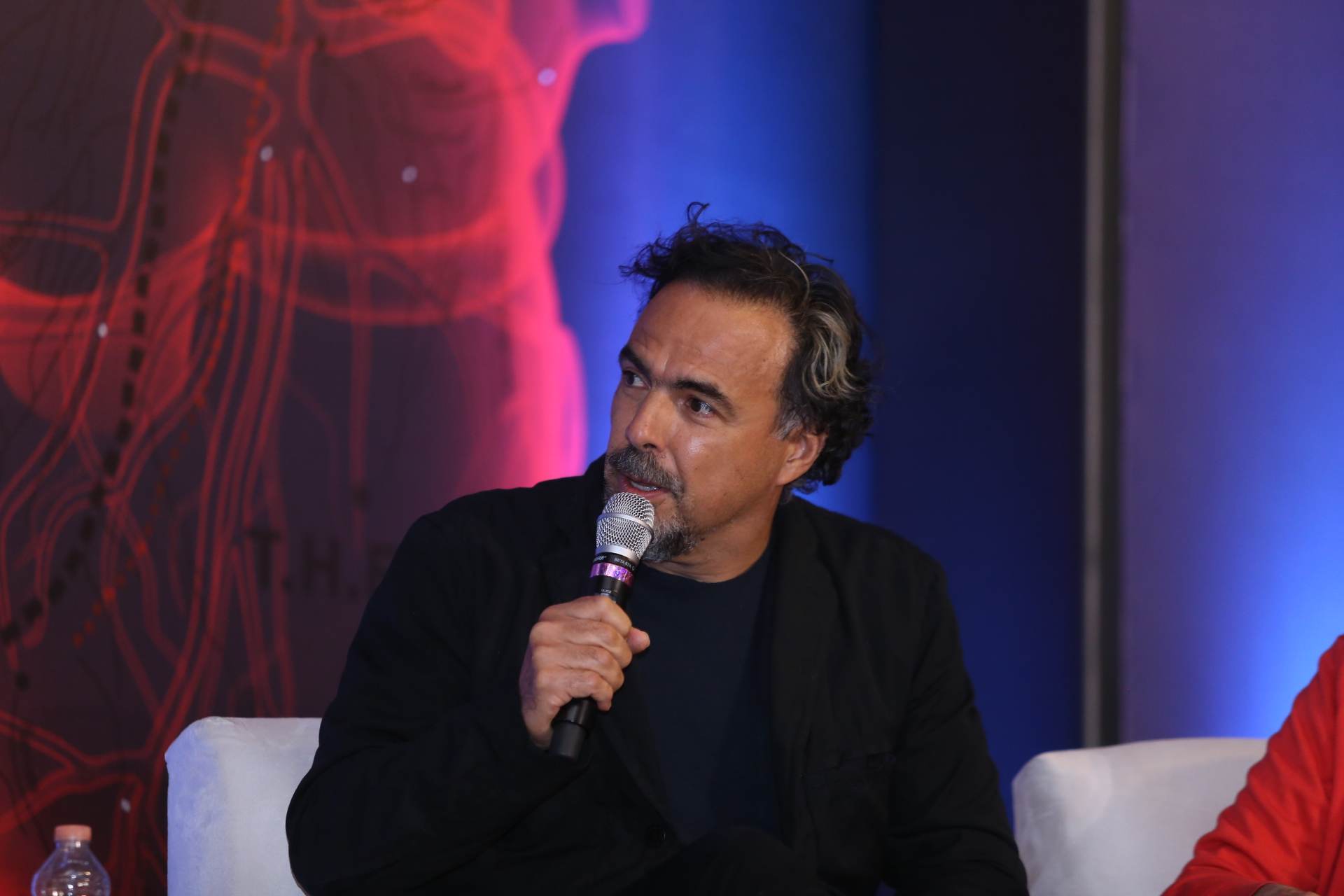 Inauguración de la Exposición “Carne y Arena (Virtualmente presente, Físicamente invisible)" de Alejandro González Iñárritu